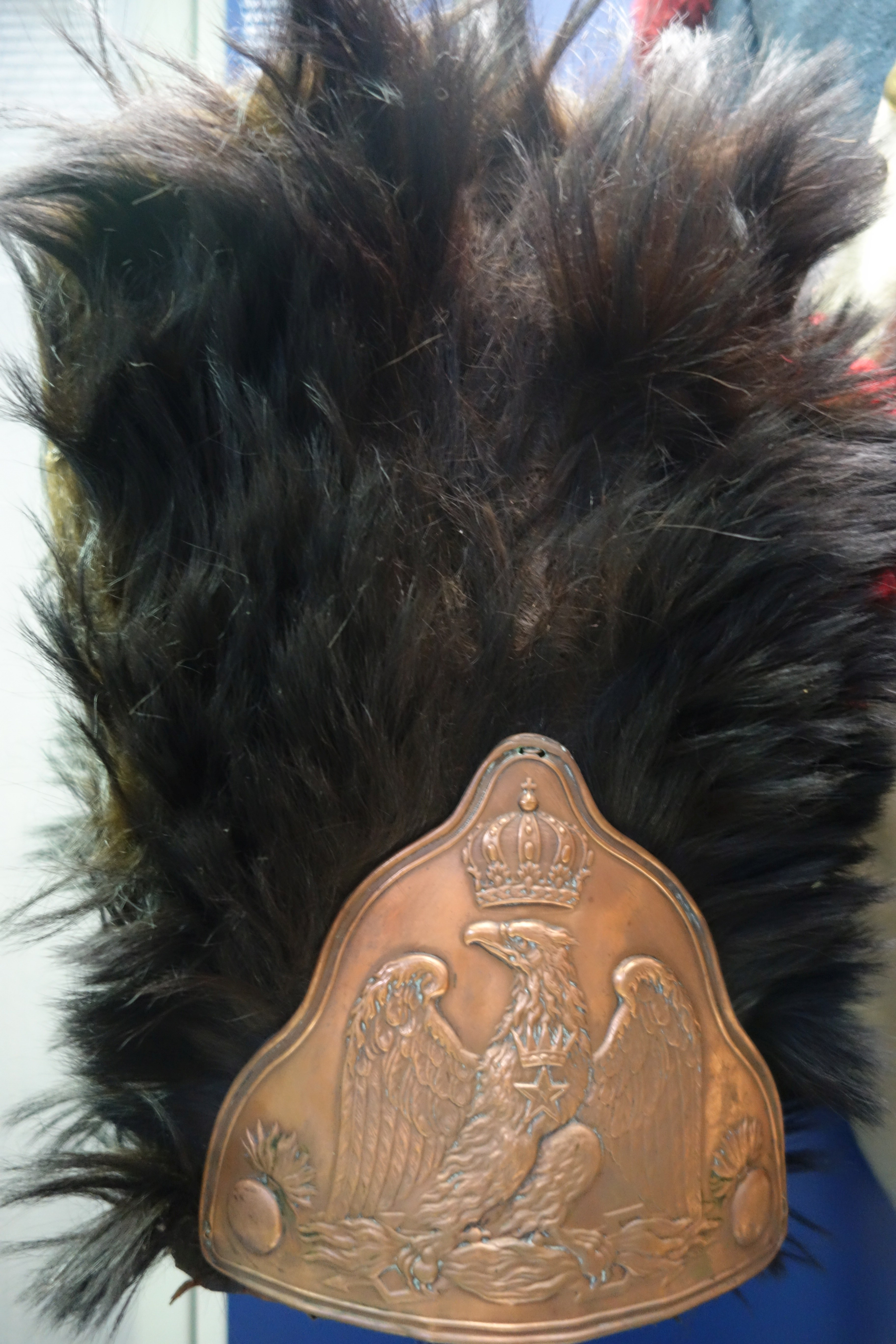 Museum zur Völkerschlacht bei Leipzig, Bärenfellmütze eines Gardegrenadiers des Königreichs Italien.